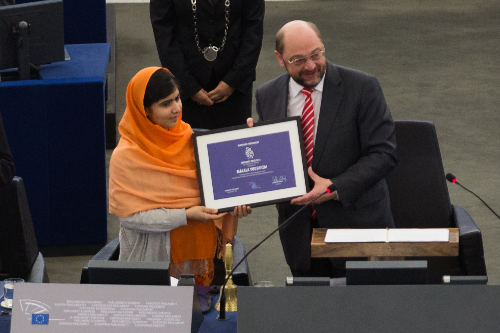 Remise du Prix Sakharov à Malala Yousafzai Strasbourg 20 novembre 2013